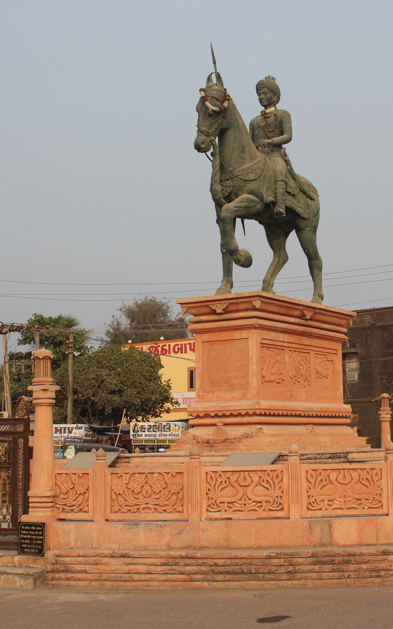 Vir Hamirji statue at Somnath